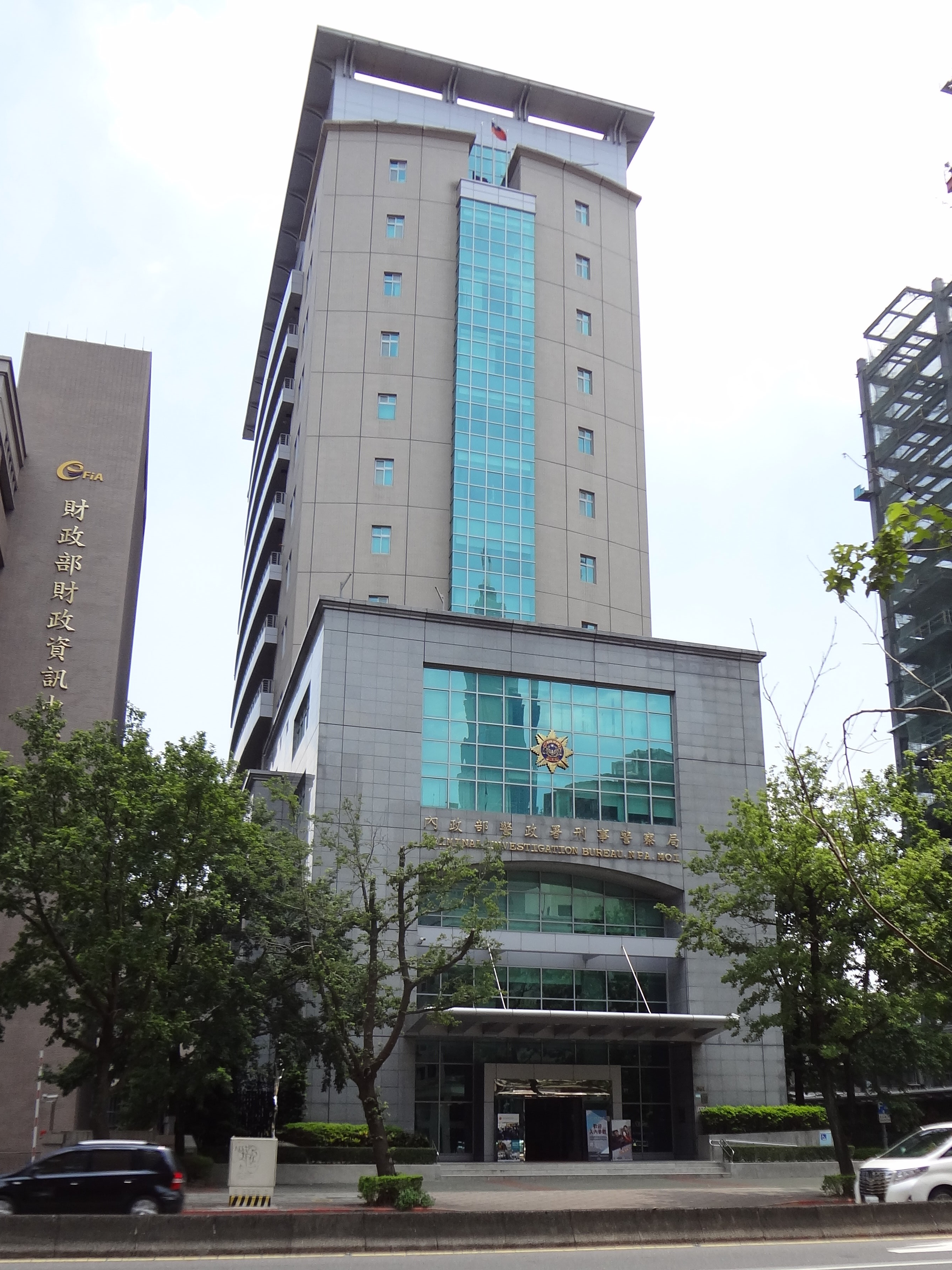 中華民國內政部警政署刑事警察局刑事科技大樓，位於臺灣臺北市信義區忠孝東路四段551號。